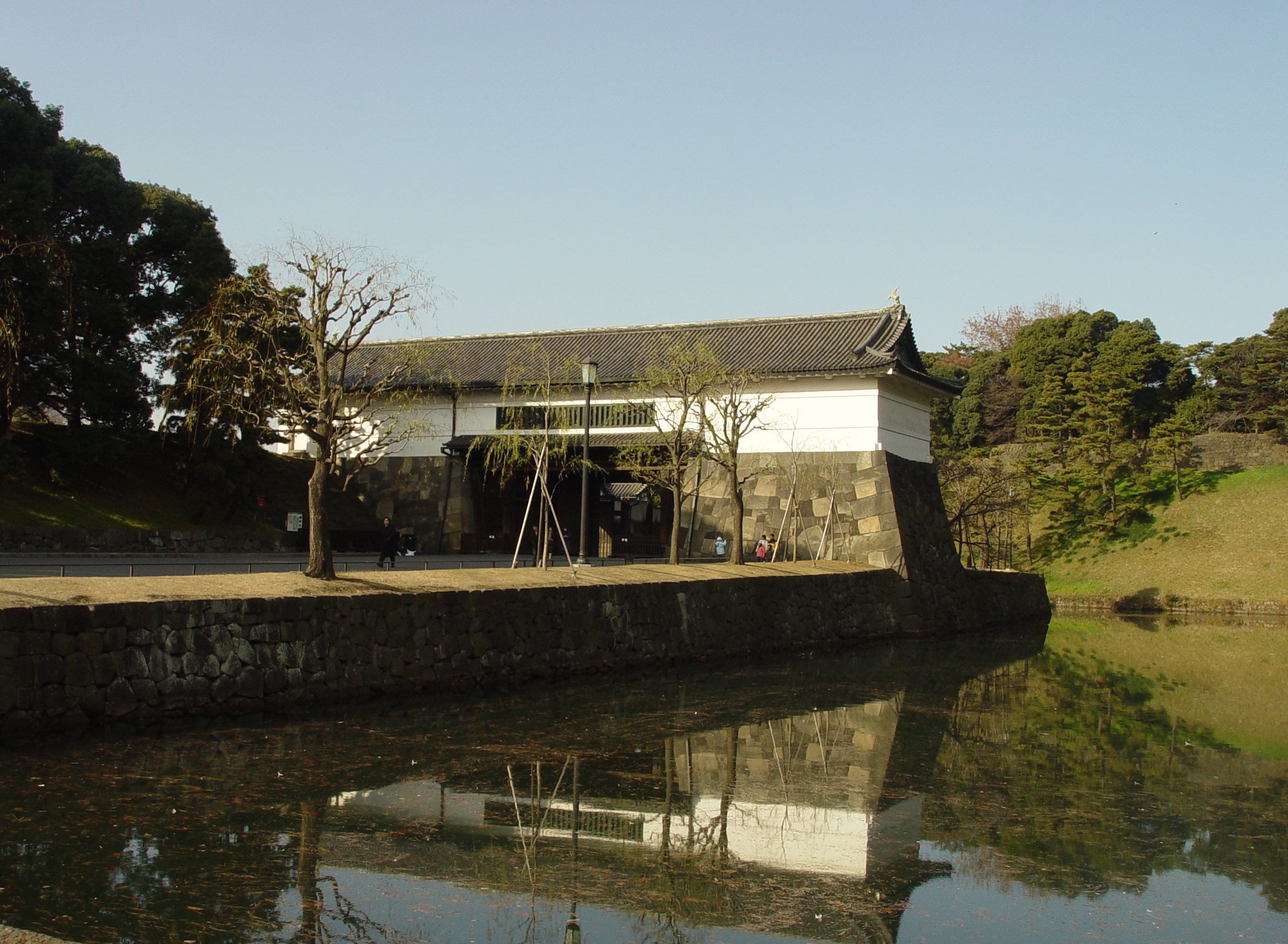 Sakurada-mon gate, Tokyo, Japan 桜田門